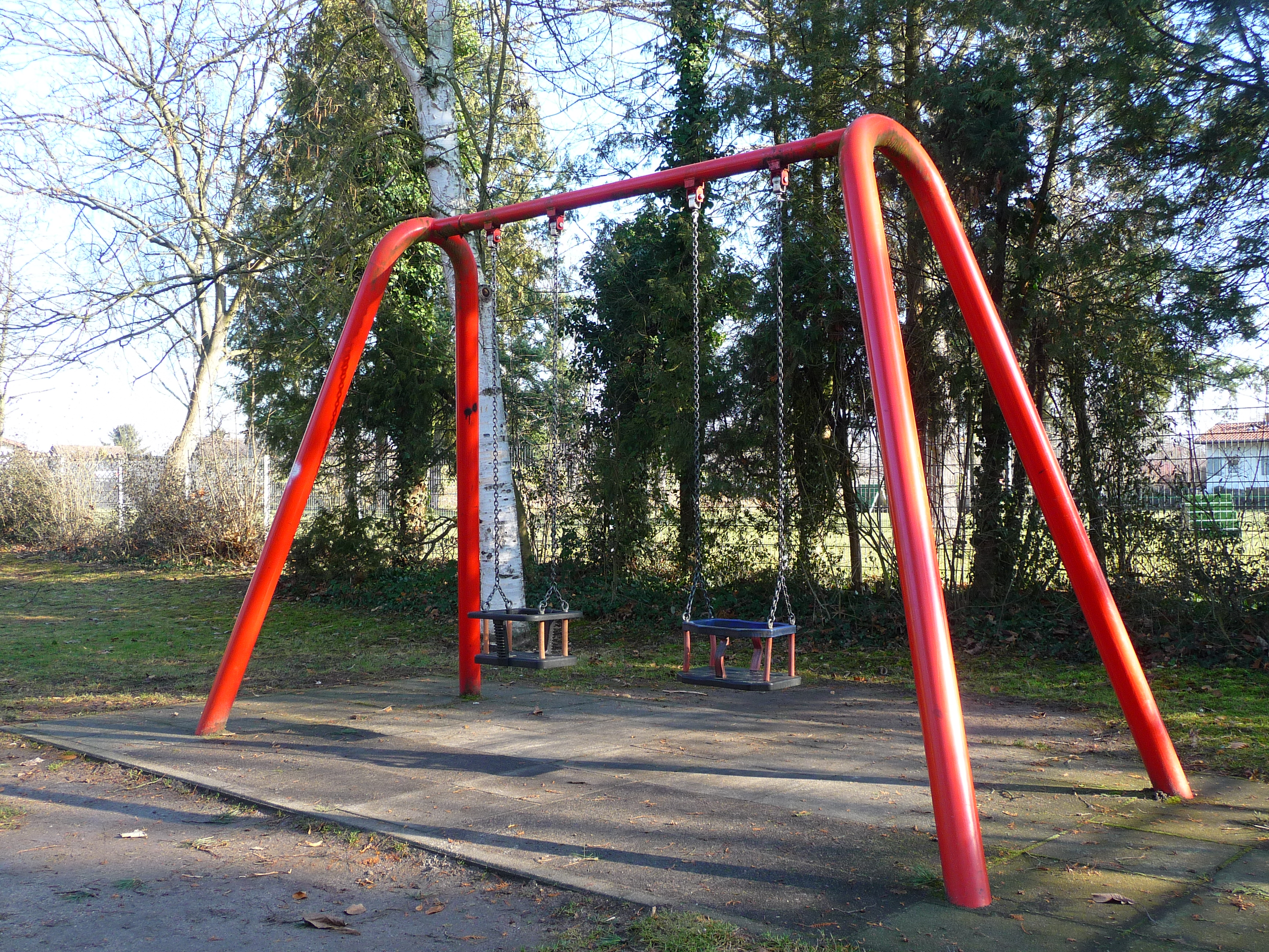 Kinderschaukel für Kleinkinder